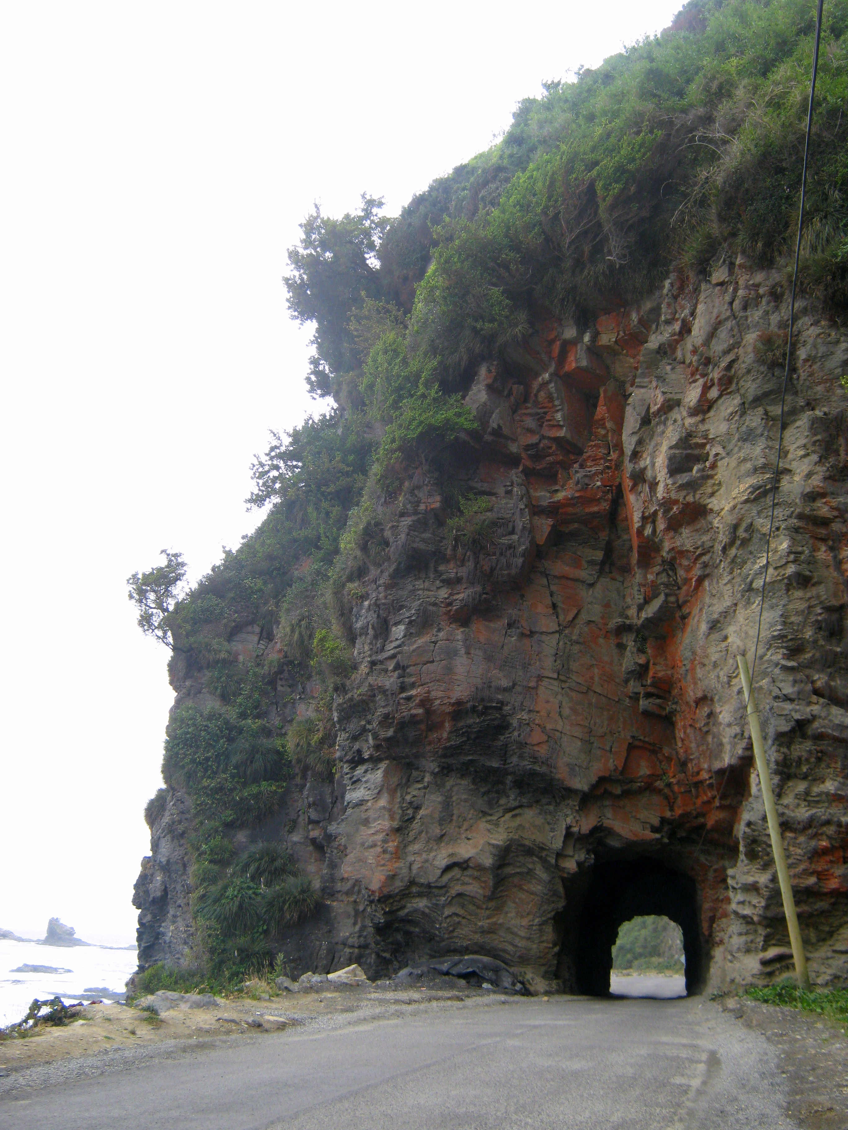 Portal de acceso al balneario de Pucatrihue